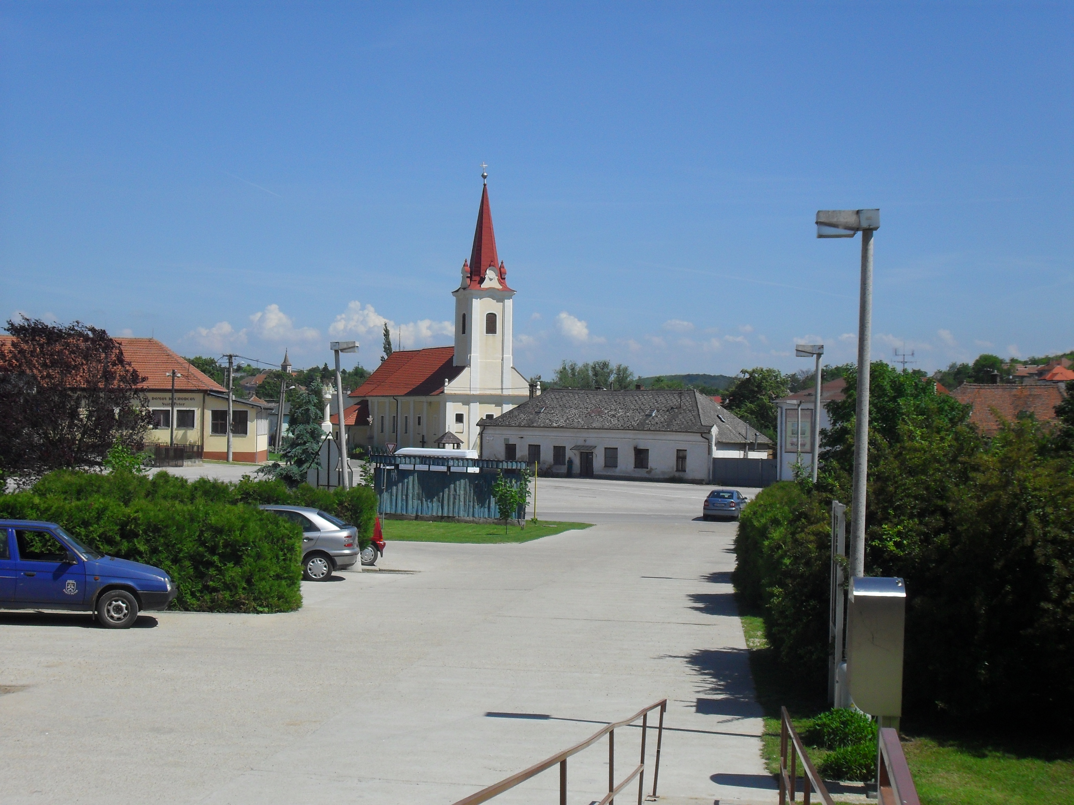 Komáromszentpéter